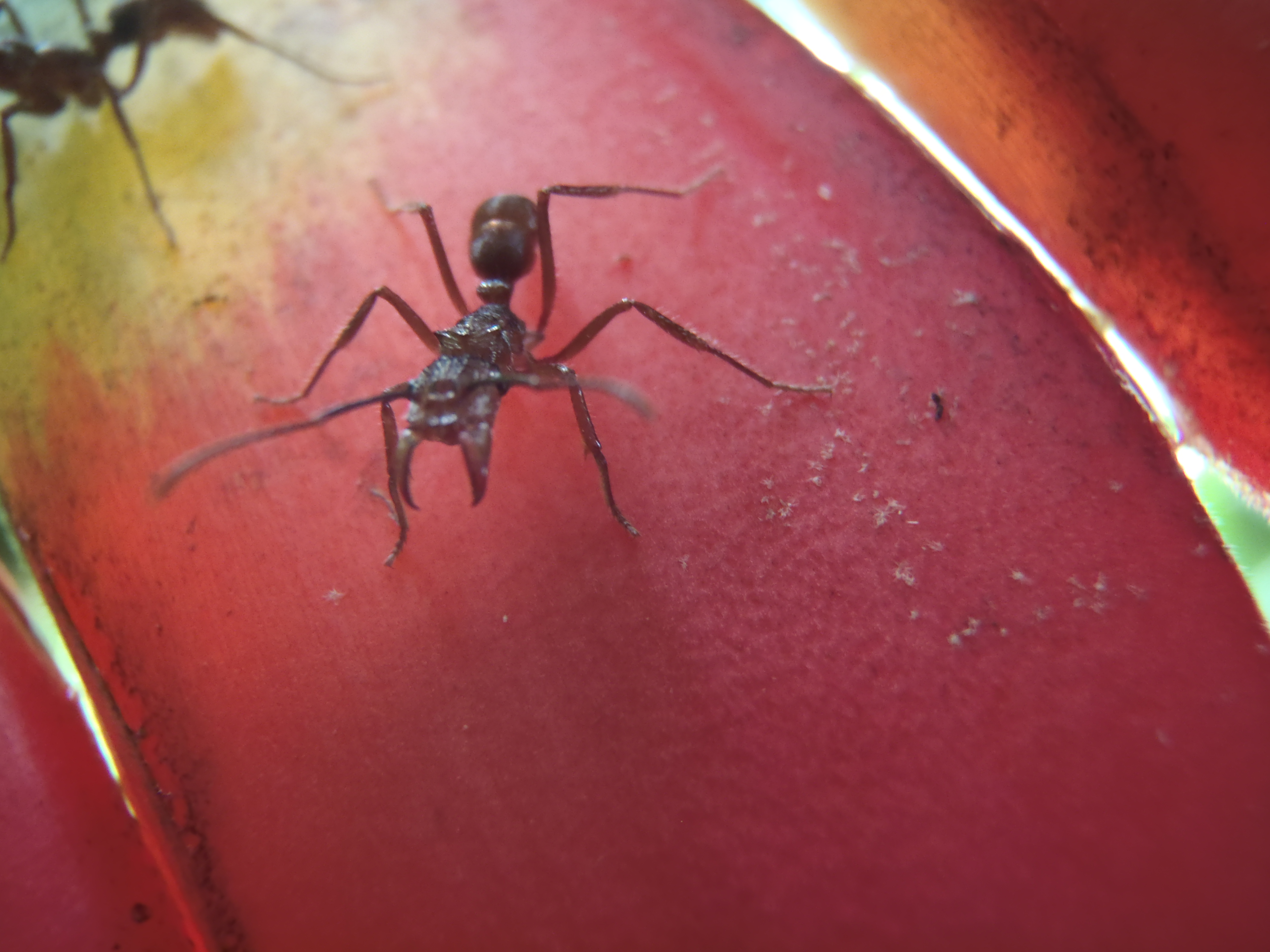 Fourmis géante, près de Tarapoto, dans la jungle péruvienne